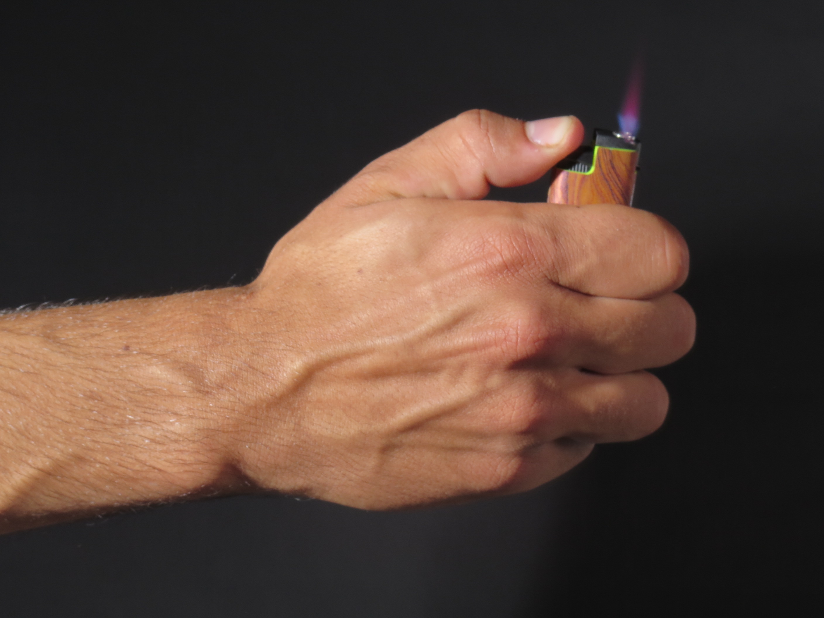 מצית טורבו